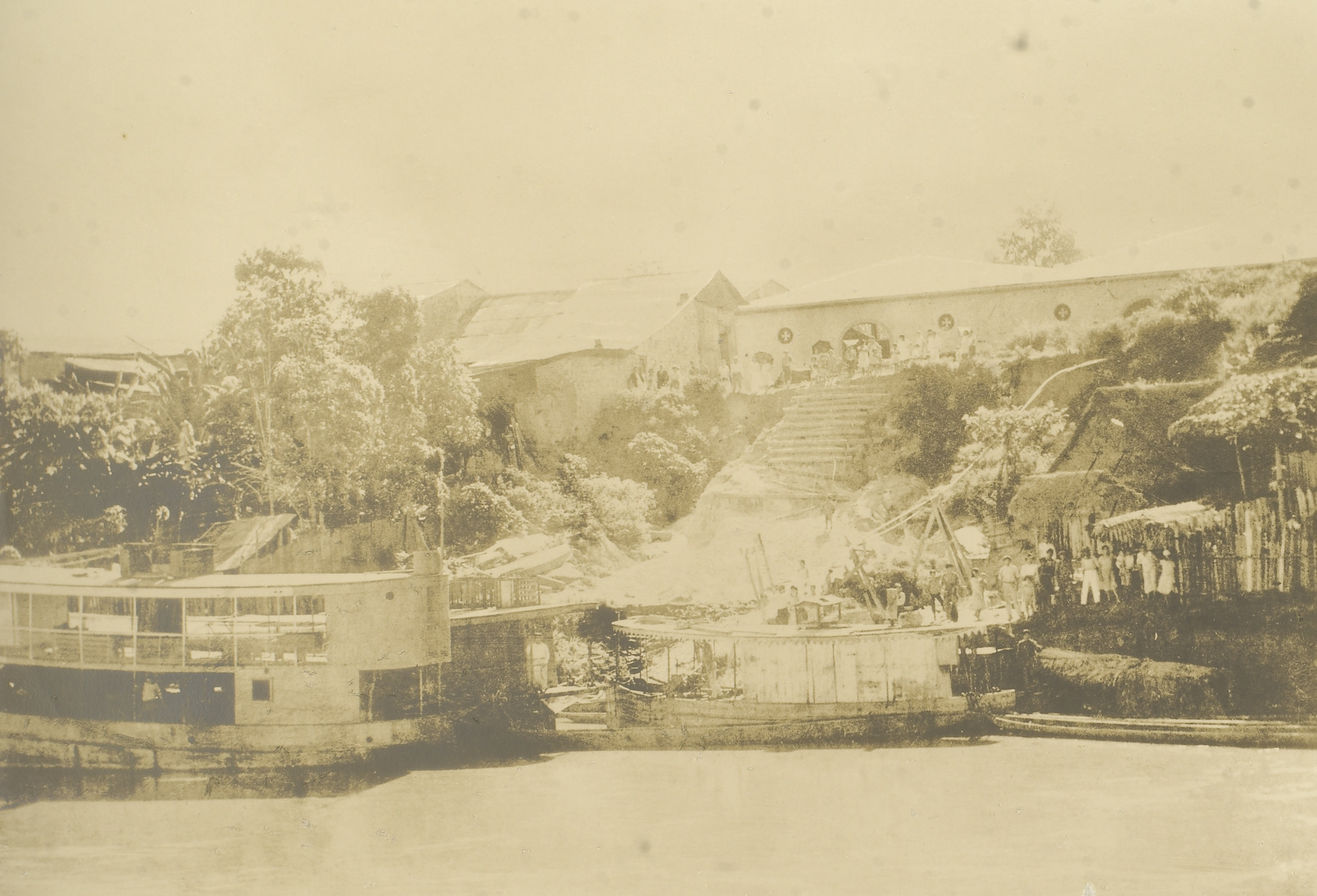 Imagem do Fundo Ministério da Guerra, do Arquivo Nacional